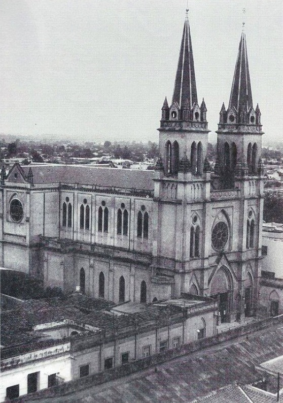 Iglesia de la Merced de la ciudad de Salta en la decada de 1970